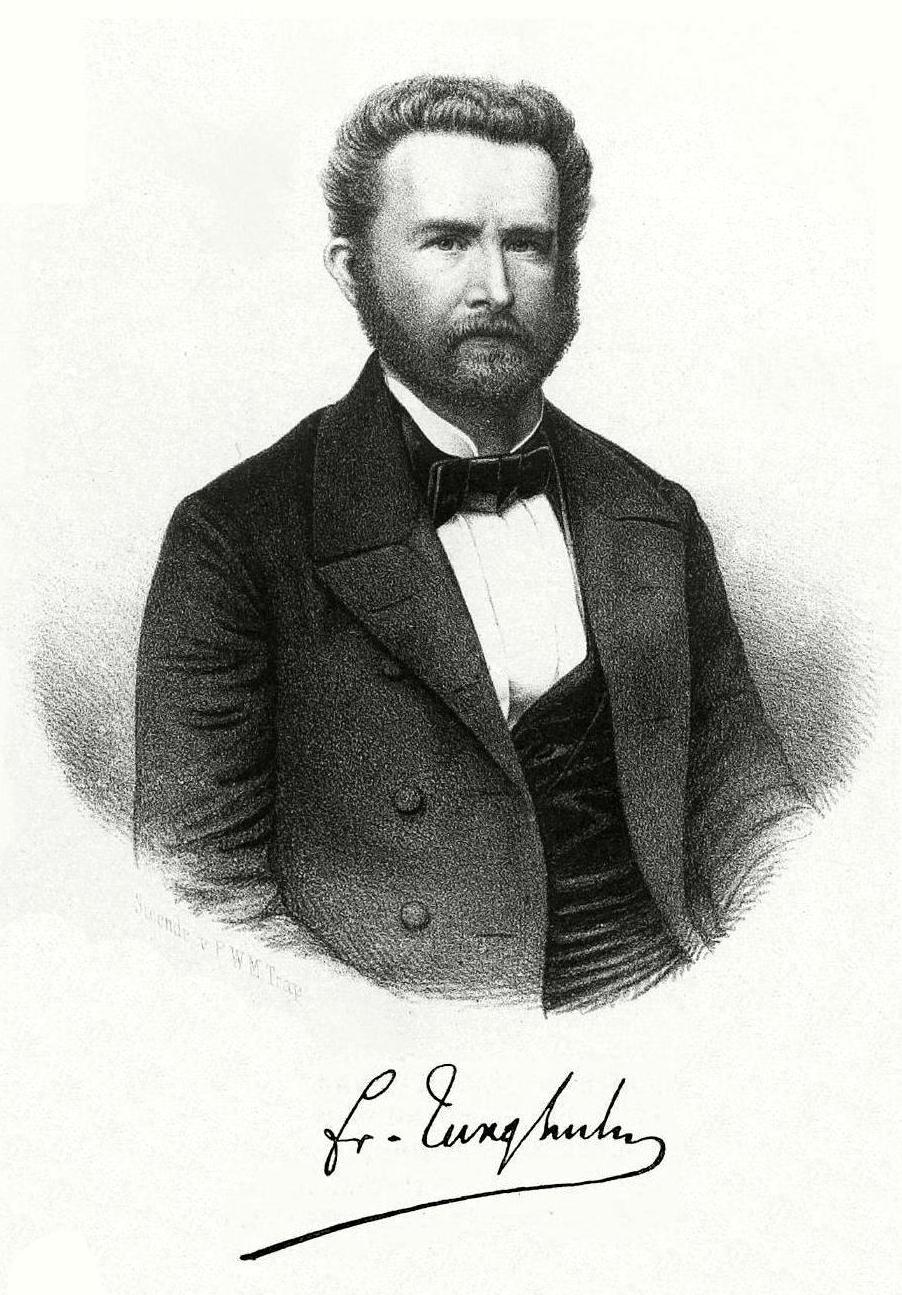 Titelbild aus "Licht- und Schattenbilder ..."